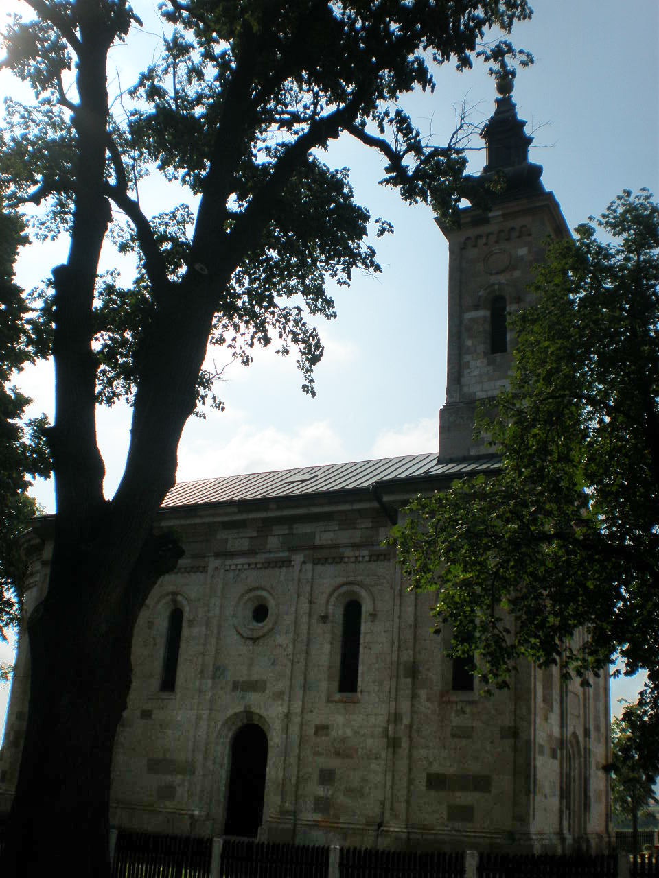 no original description